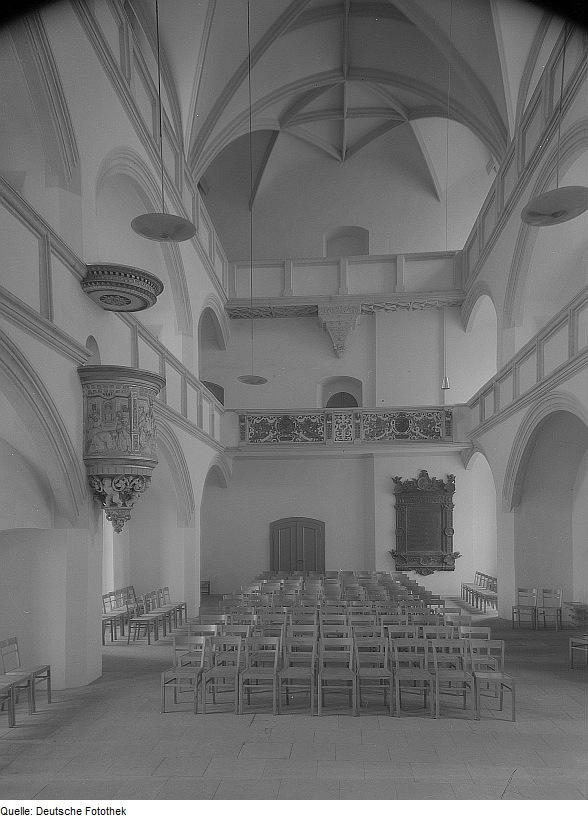 Original image description from the Deutsche Fotothek Torgau. Schloss Hartenfels, Kapelle (erste protestantische Kirchenneubau, 1544 von Martin Luther geweiht)